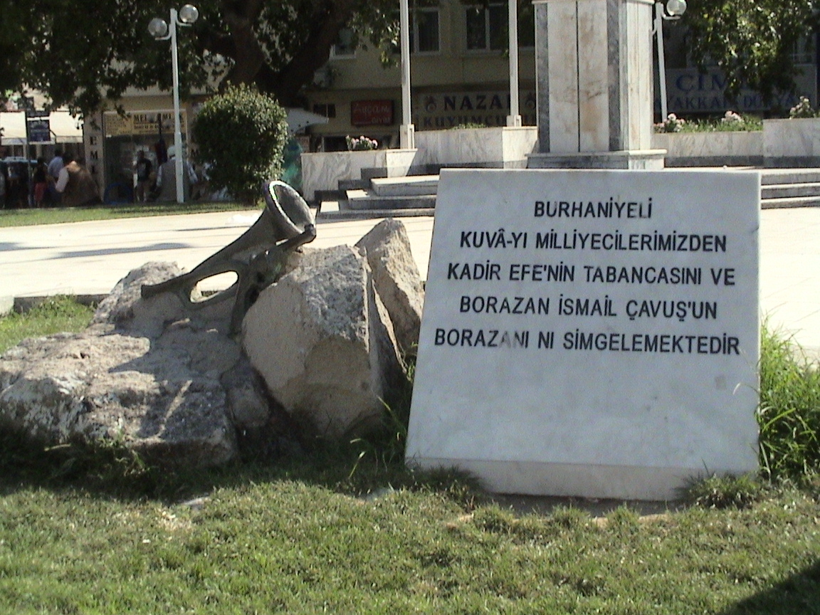 Burhaniyeli Kuvâ-yı milliyecilerimizen Kadir Efe'nin tabancasını ve Borazan İsmail Çavuş'un borazanını simgeleyen anıt. SONY DCR-DVD201E model kamera ile çekim 8 Ağustos 2007 16:30 Selçuk Bağrışen